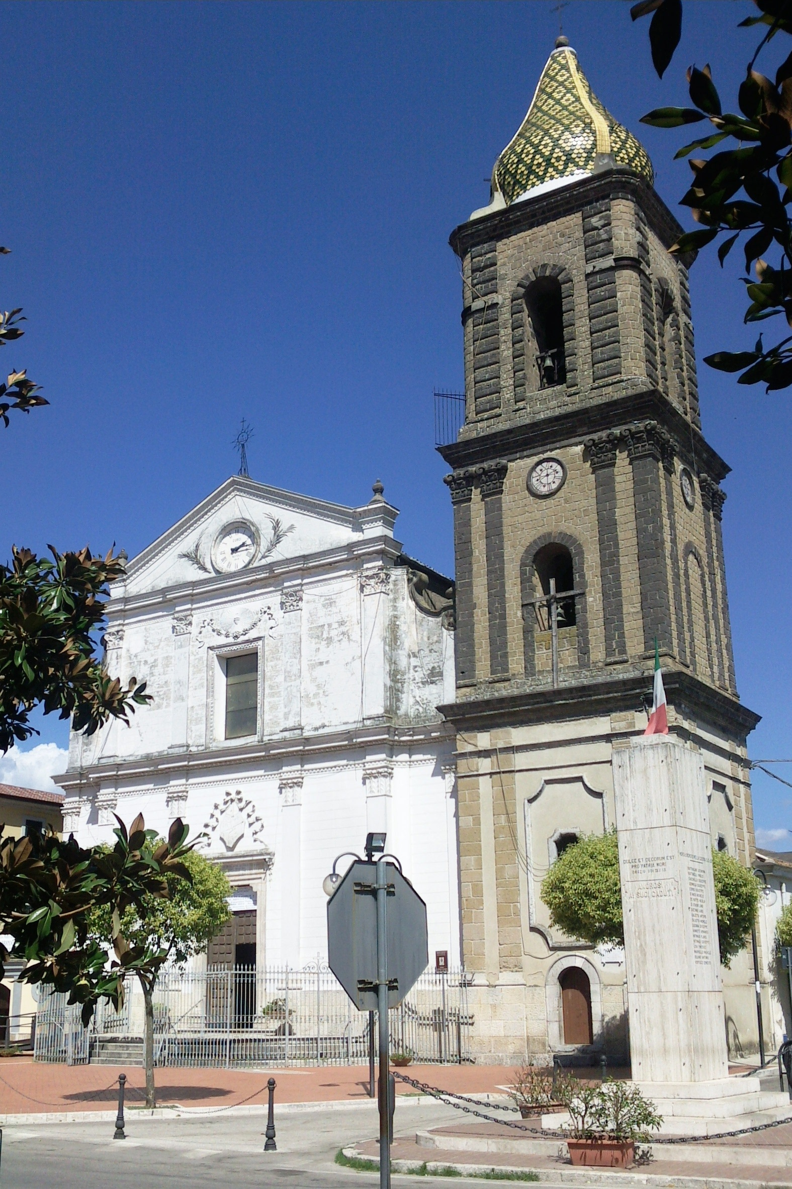 Amorosi (BN). Facciata e campanile della chiesa di San Michele Arcangelo. In primo piano il monumento ai caduti nella prima guerra mondiale